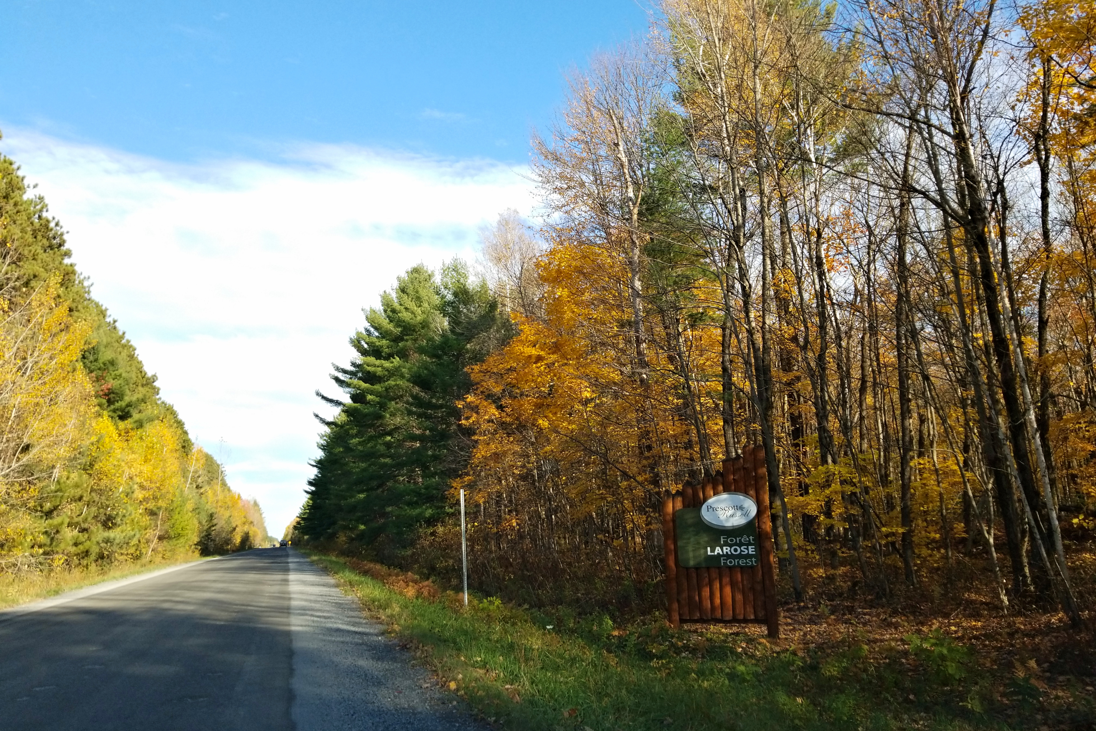 Larose Forest, Ontario, Canada